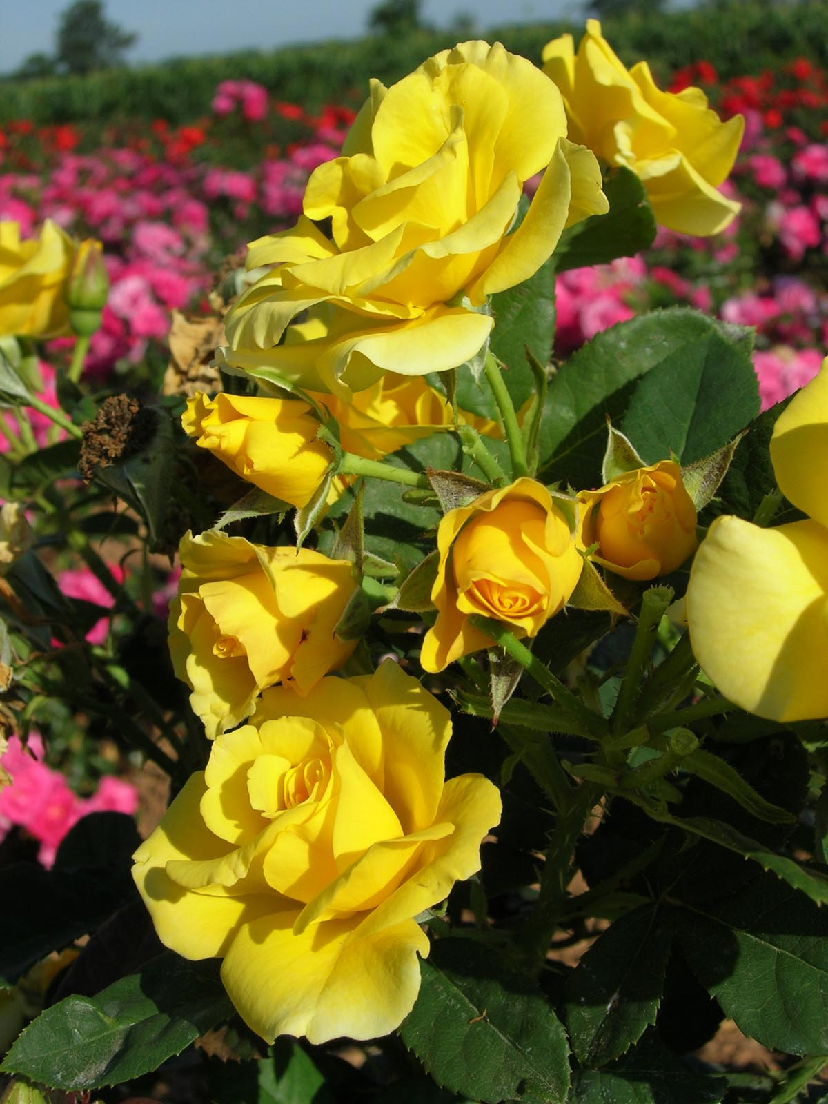 Variété de rose créée pour les 140 ans de Haemmerlin